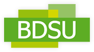 BDSU-Logo